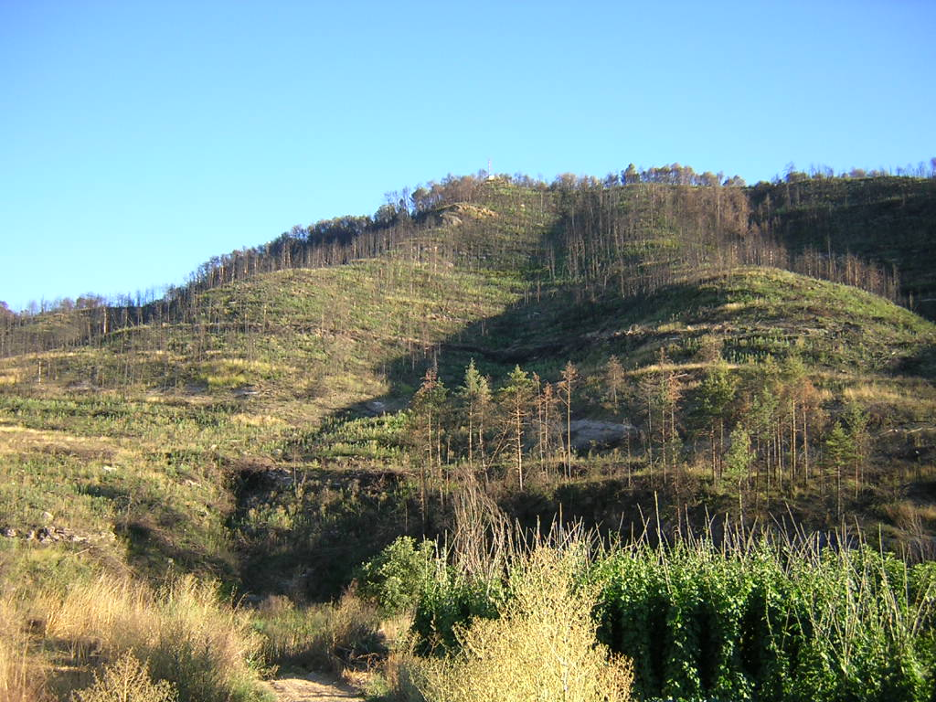 Divisòria entre la Baga de Saladic (esquerra) i la del Solà (dreta). Monistrol de Calders, Moianès.